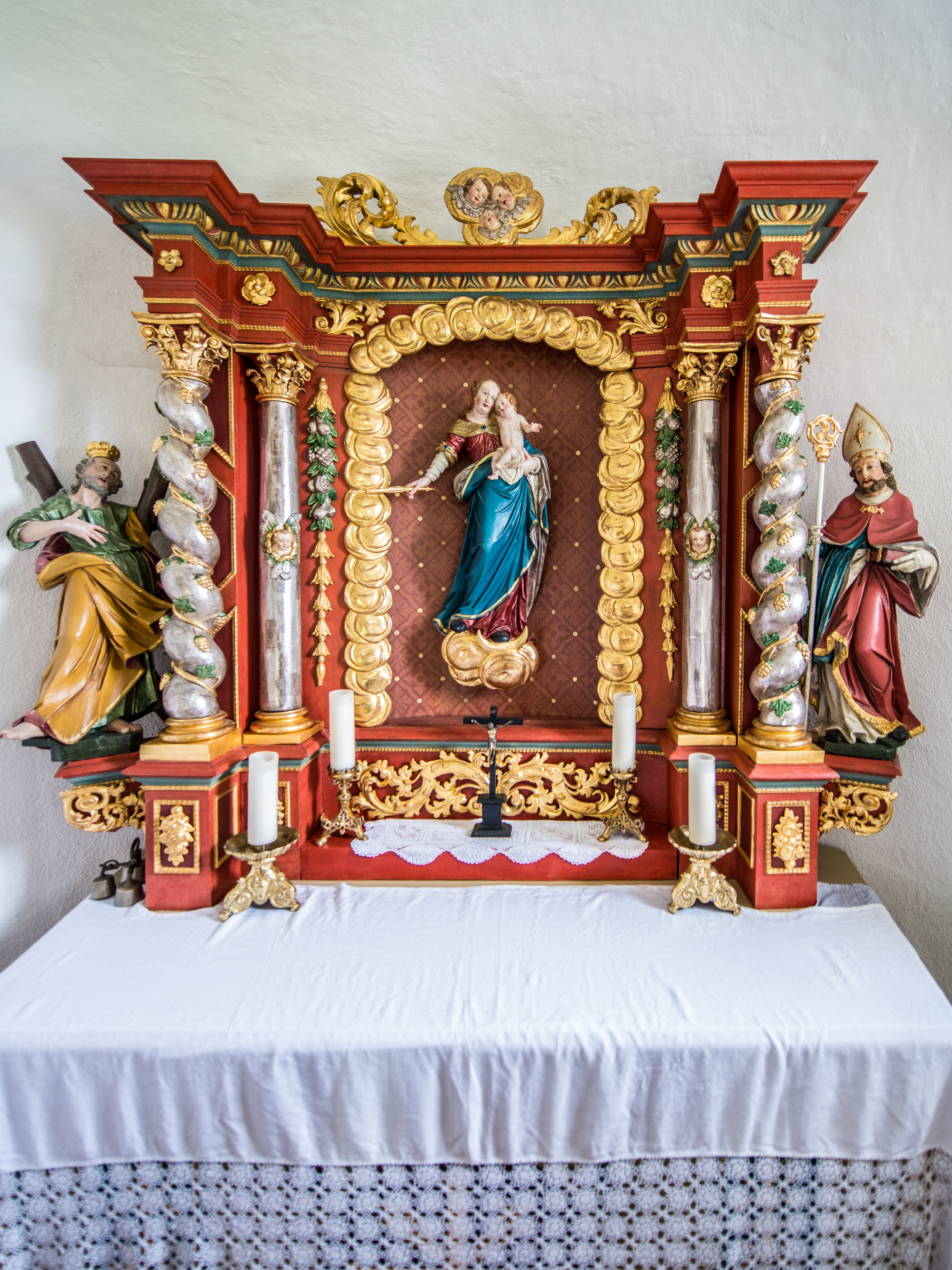 Kapelle Hl. Anna in Fontanella - Faschina. Der Steilhang im Hintergrund gehört zum Sonnenköpfle. aus dem DEHIO Vorarlberg 1983: Um 1700 als Stiftung von Dr. Josef Hartmann (später 1717-1720 Bürgermeister von Wien) erbaut. 1951/52 Restauriert. Rechteckbau mit Rundapsis unter gemeinsamem Satteldach und Glockendachreiter im Osten. Im Westen Vorzeichen mit Pultdach auf 2 Stützen, beschindelte Westgiebelfassade. Flachgedeckter Betraum mit Holzfelderdecke, eingezogener rundbogiger Chorbogen, Chorraum mit Wölbung. Barocker Altaraufbau um 1700, Altarbild hl. Anna mit Maria, Erstes 19. Jh., Figuren Hll. Maria mit Kind, Nikolaus, Andreas deponiert. Über dem Chorbogen Akanthuskartusche mit Relief Gottvater um 1700.